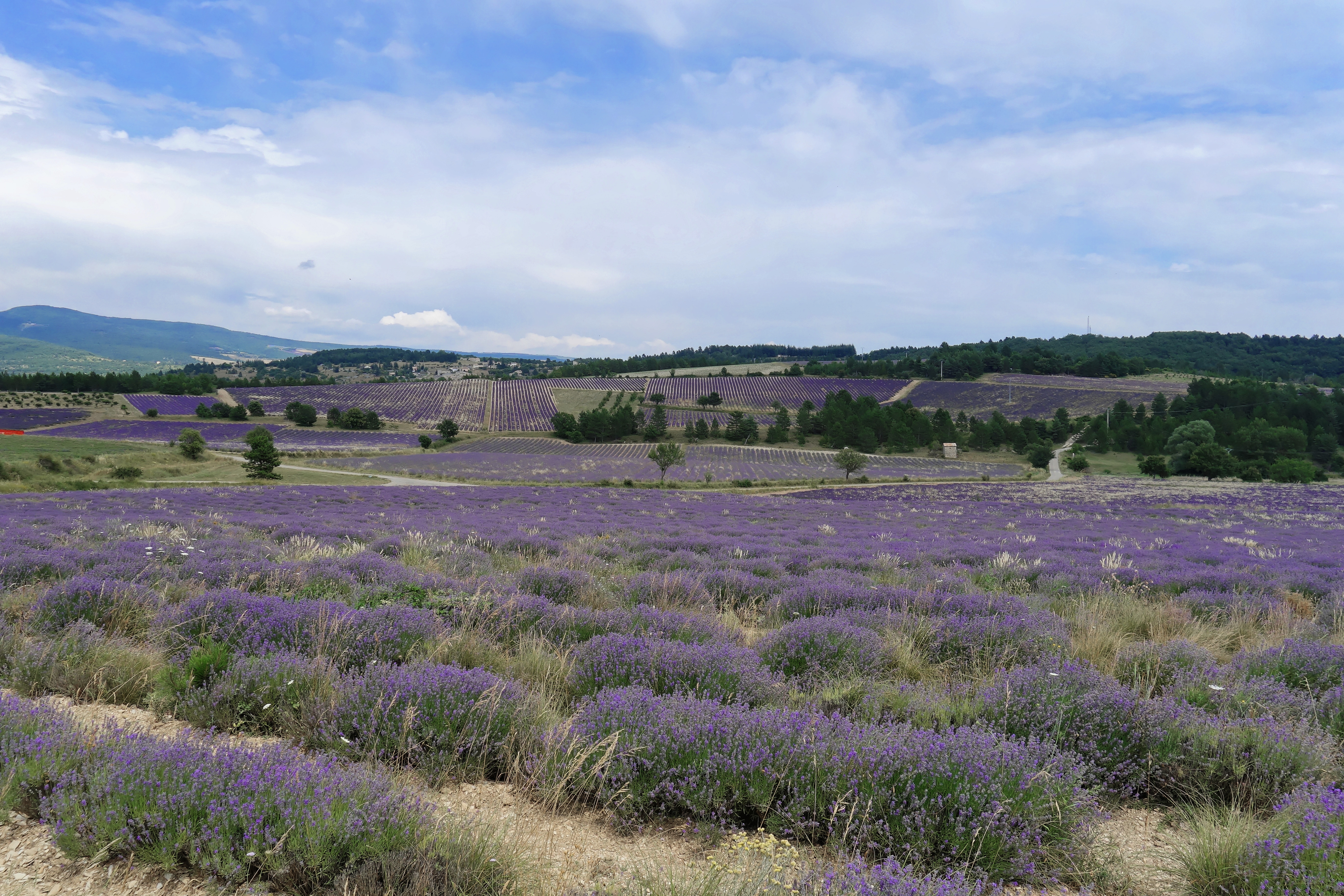 Des champs de lavandes à Sault.